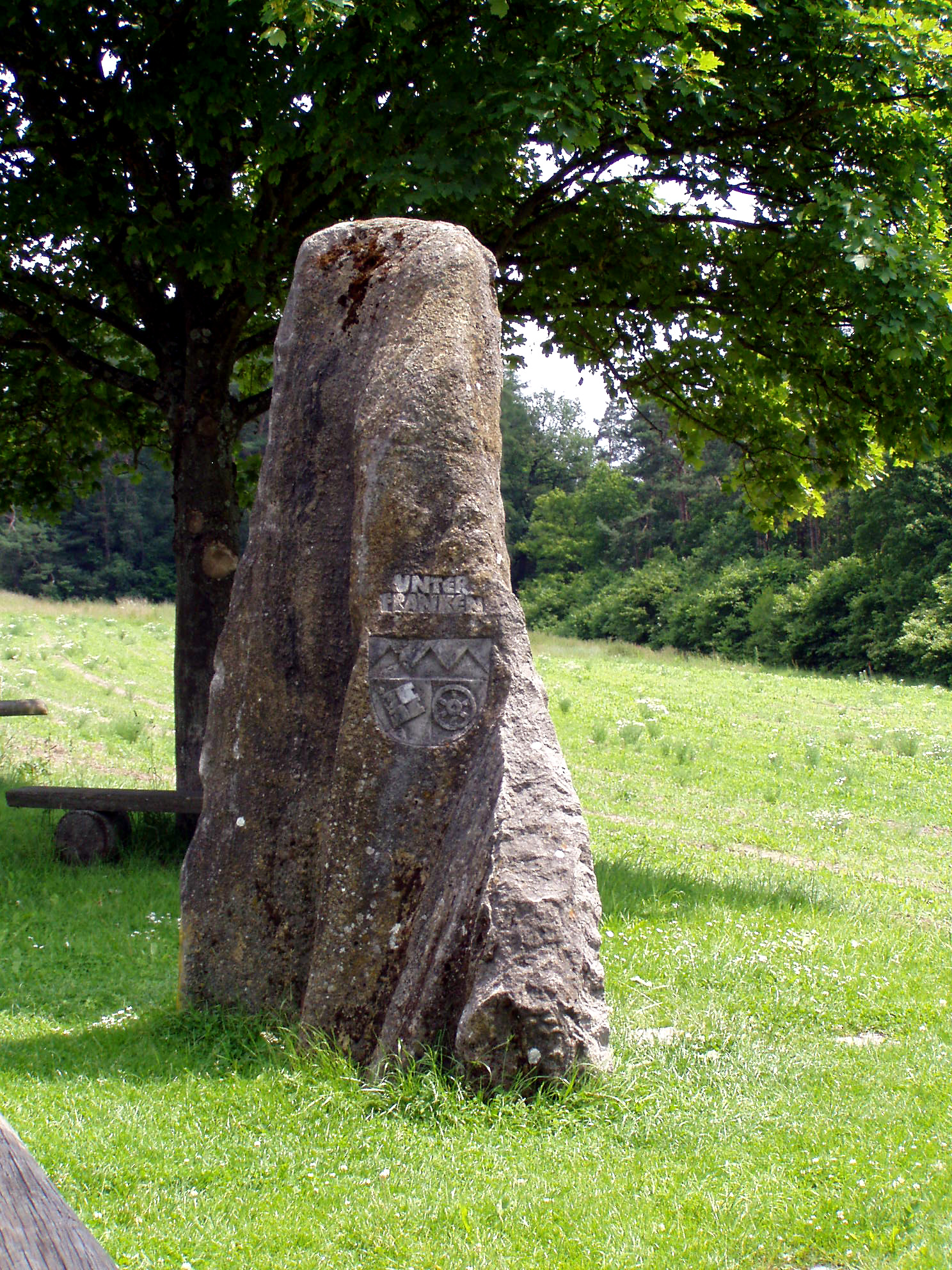 Der 'Dreifrankenstein' bei Schlüsselfeld / Oberfranken